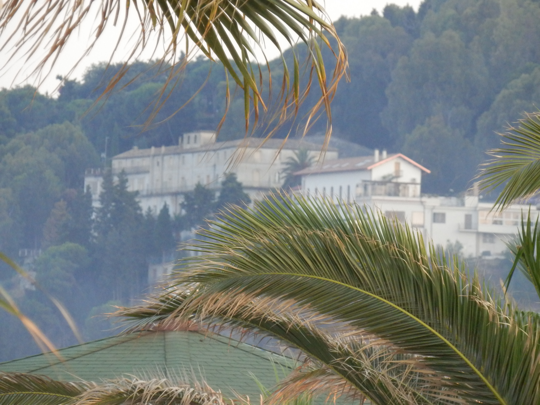 Motel Copanello sulla Coscia di Staletti